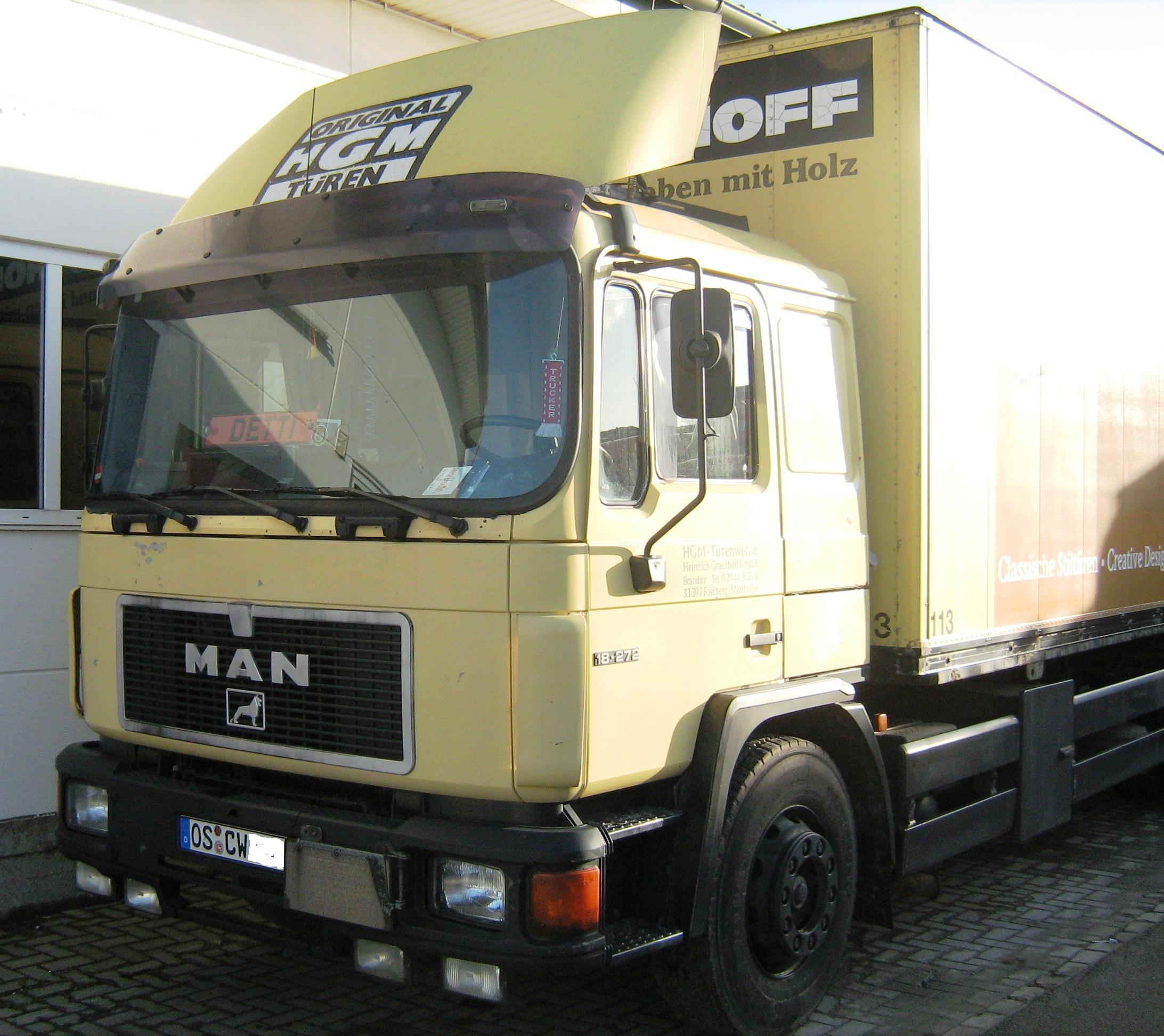 MAN LKW Typ F 90 18.272.